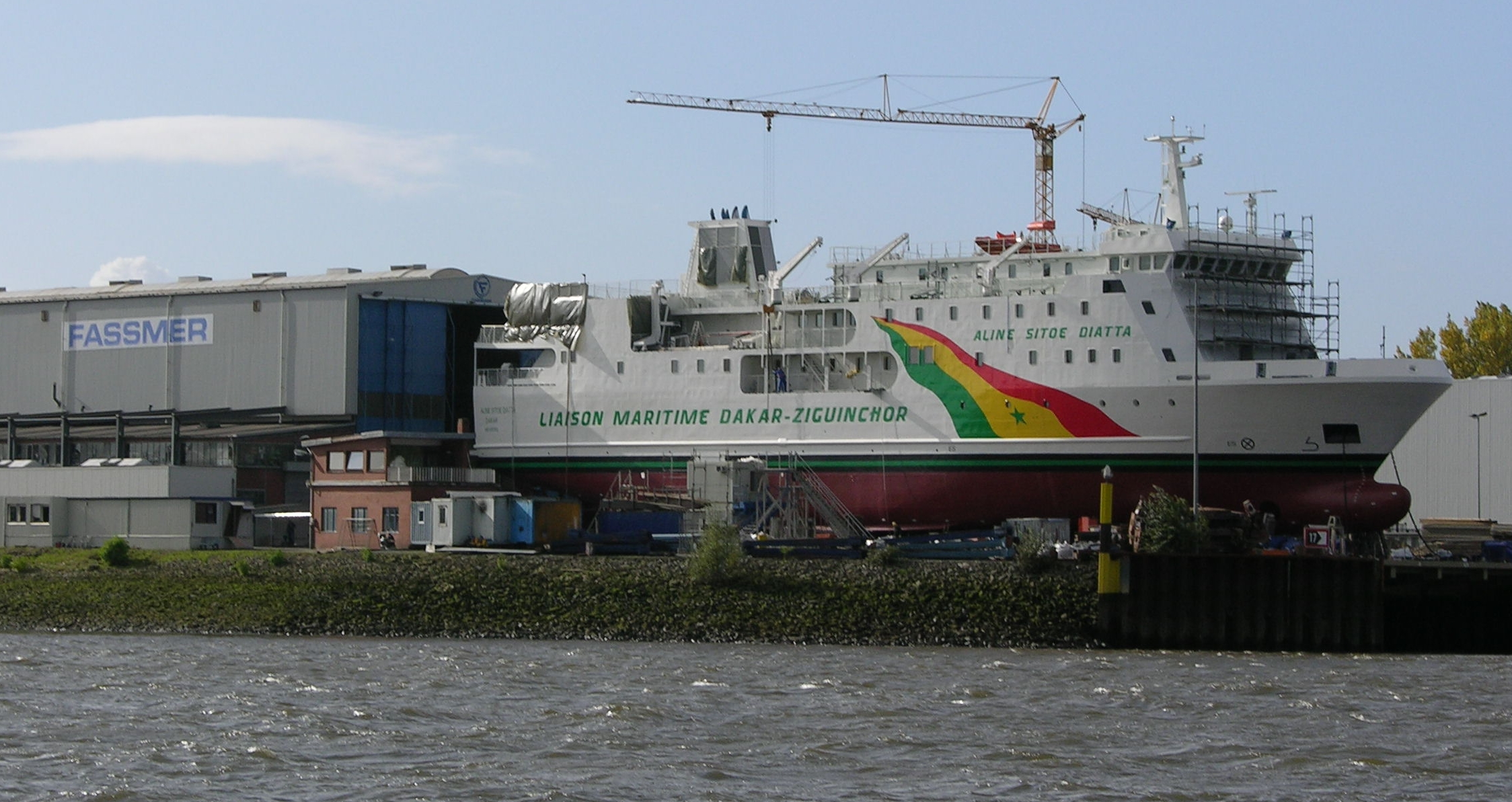 Ro-Pax-Fähre "Aline Sitoe Diatta" (Baunummer: 2060), gebaut durch die Werft Fr. Fassmer GmbH & Co. KG, Berne